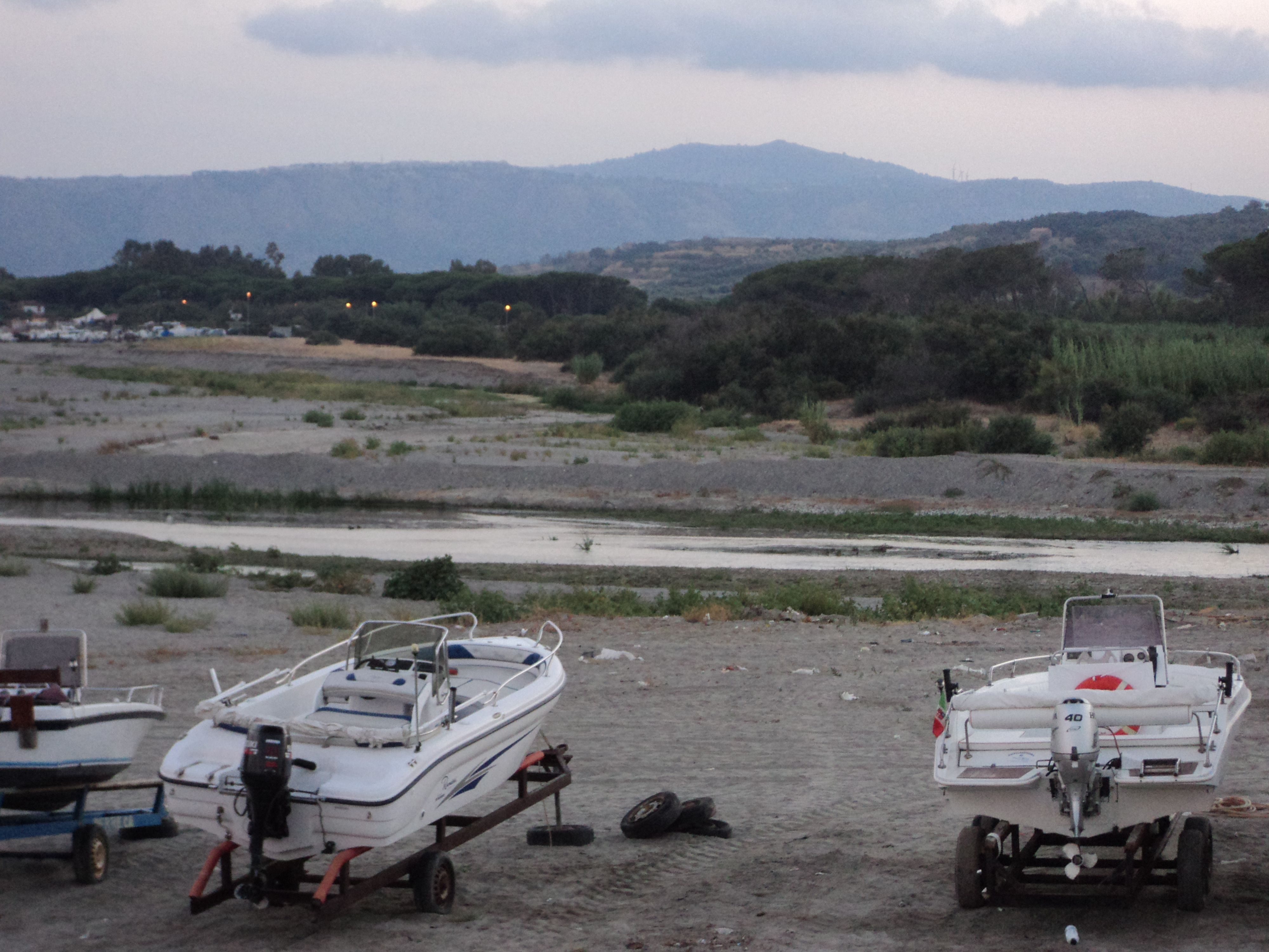 Fiume Corace